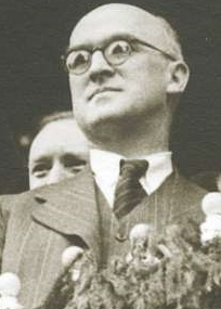 Besuch von Gebhard Müller und General Marie-Pierre Kœnig in Weingarten am Blutfreitag 27. Mai 1949, auf dem Rathausbalkon zu sehen: Marie-Pierre Kœnig, Bischof Carl Joseph Leiprecht, Gebhard Müller, Aloisius Muench, Noiret und Guillaume Widmer